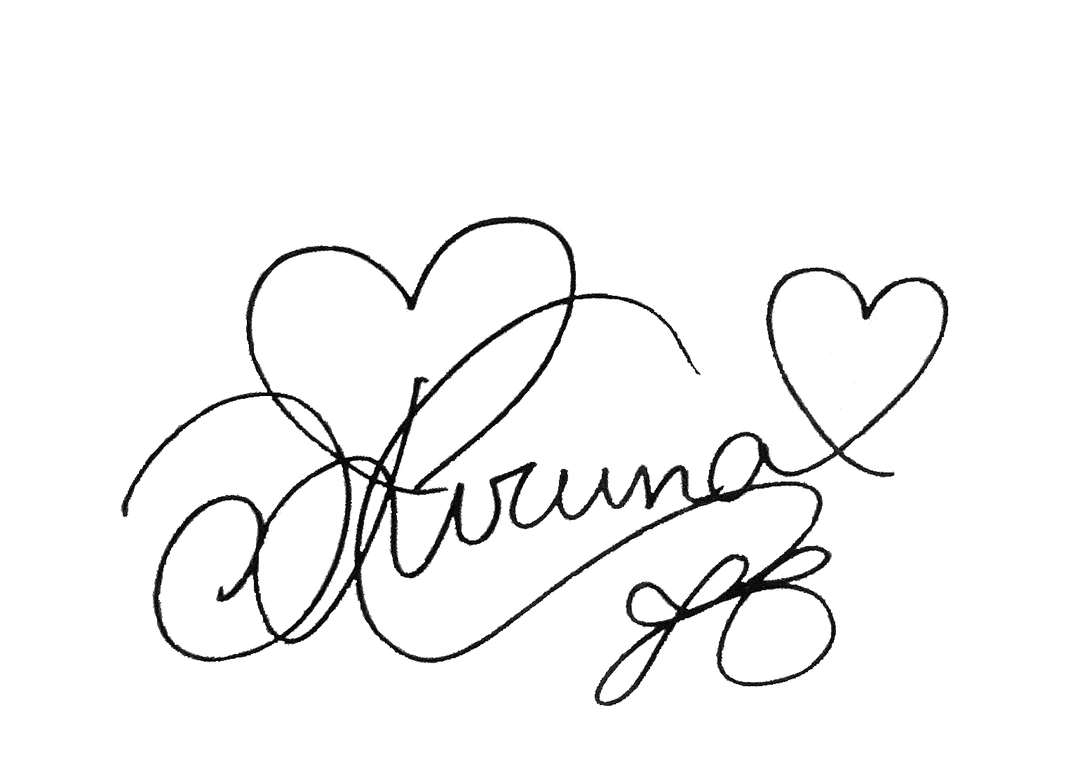 佐倉絆署名